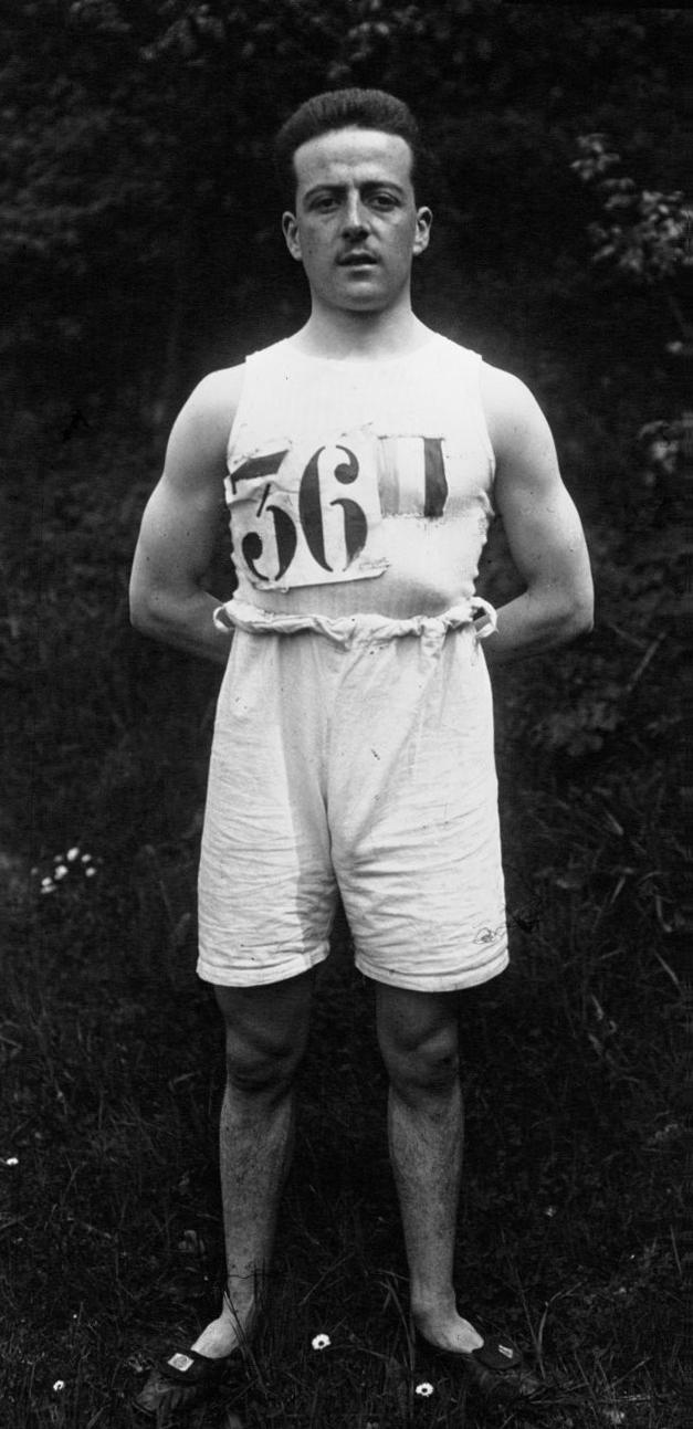 St-Cloud : Critériums Nationaux militaires : 110 m haies : Seurin : [photographie de presse] / Agence Meurisse